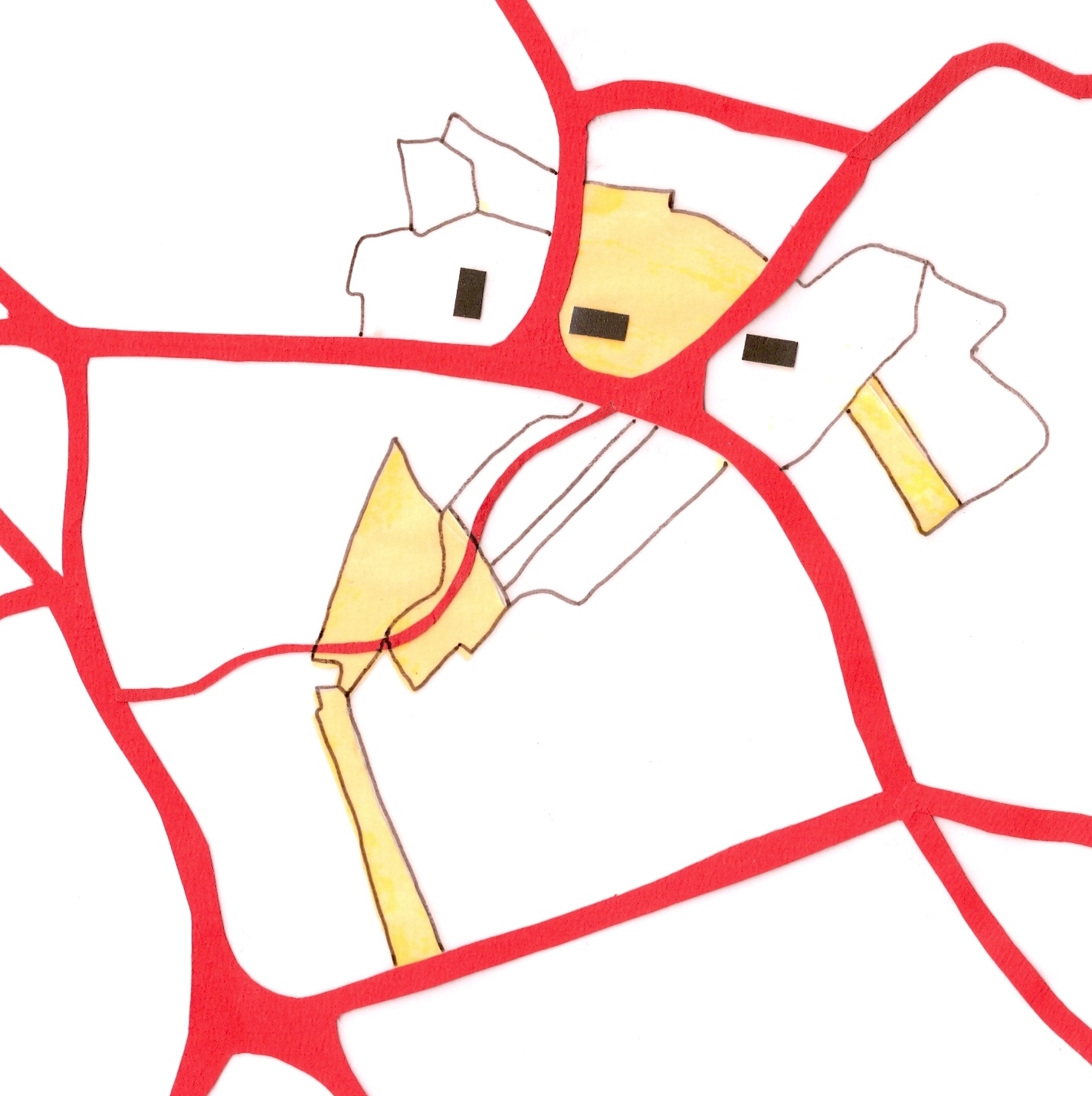 De percelen van de Plashoeve na de eerste boedelscheiding